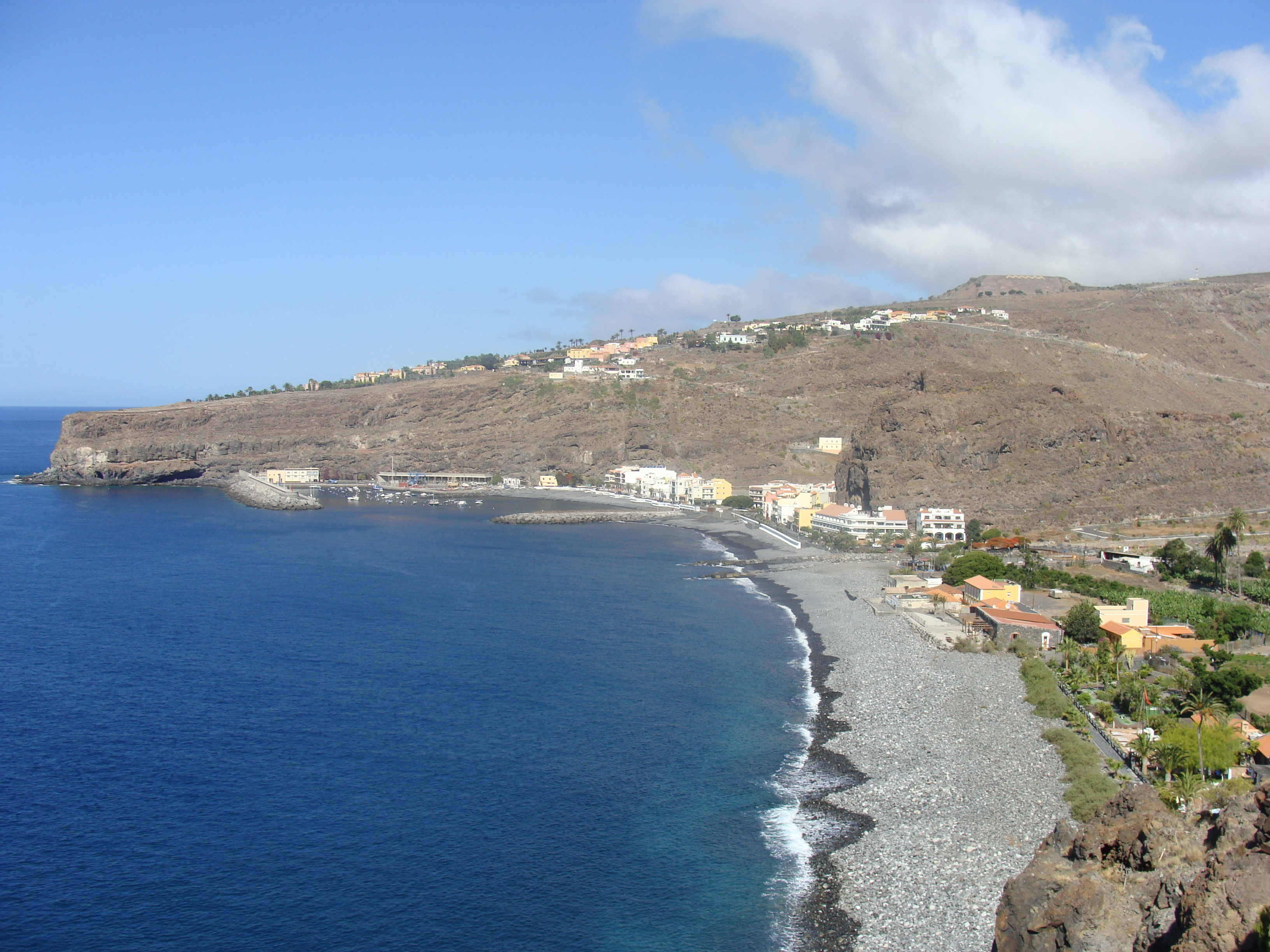 Playa de Santiago und Las Trincheras (La Gomera)